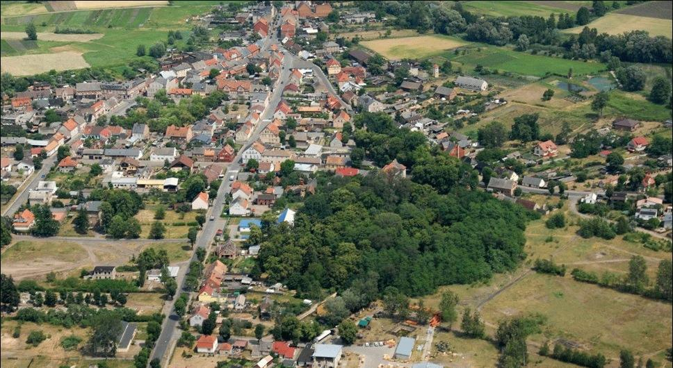 Trzciel z lotu ptaka